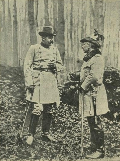 Император германский Вильгельм и эрцгерцог австрийский Франц-Фердинанд на германской императорской охоте в Шпринге.